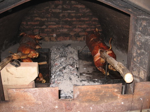 Печење прасића у фуруни која има облик полуваљка.